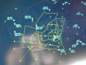 Approach radar screen, 90's generation. Image is based on primary and secondary datas.